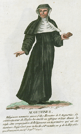 Collection de costumes de tous les ordres monastiques, supprimés à differentes époques, dans la ci-devant Belgique, Bruxelles, Philippe Joseph Maillart et sœur, 1811